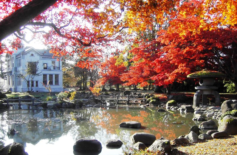 旧池田氏庭園、白亜の洋館と雪見灯籠。